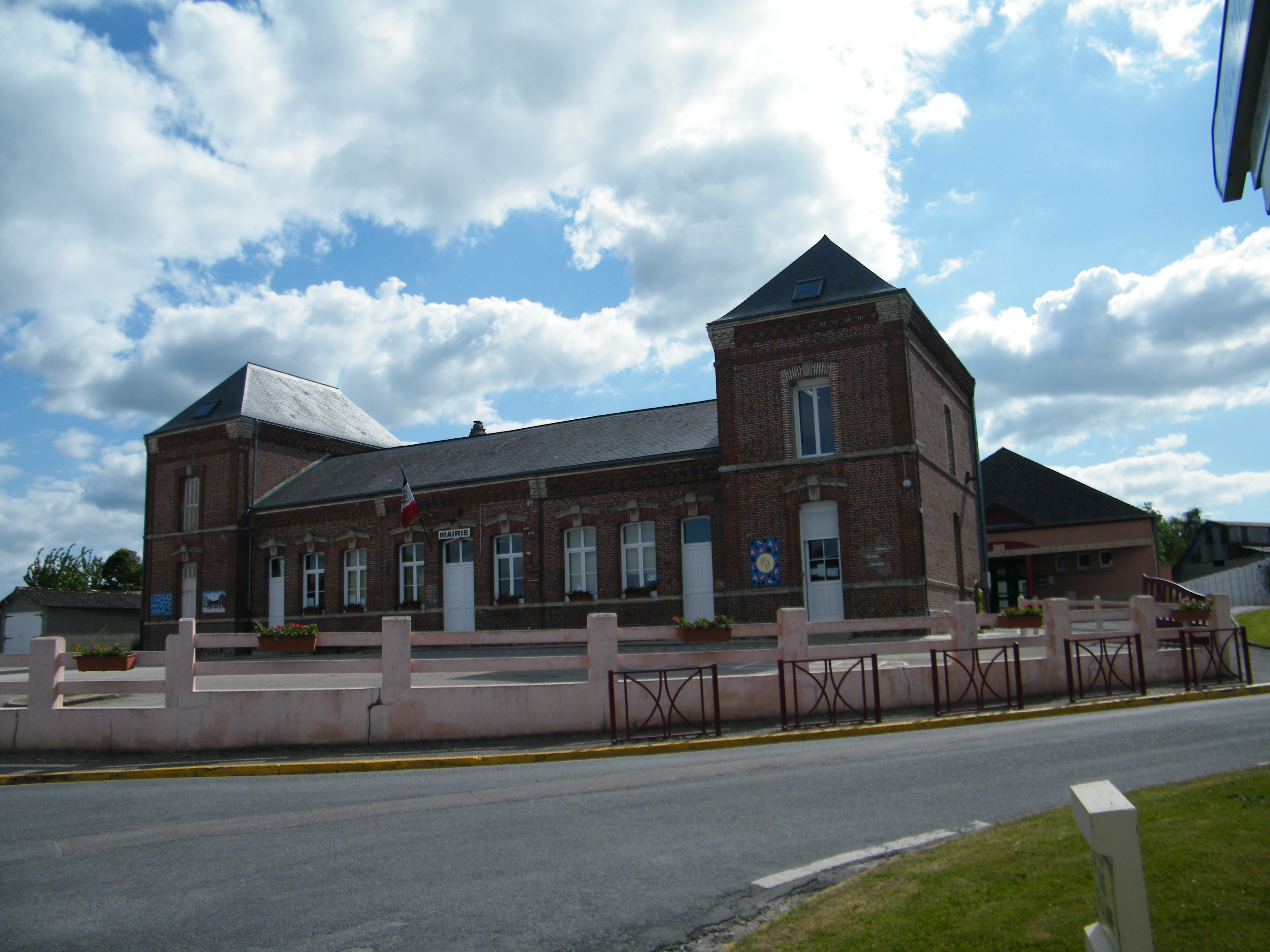 Mairie-école.